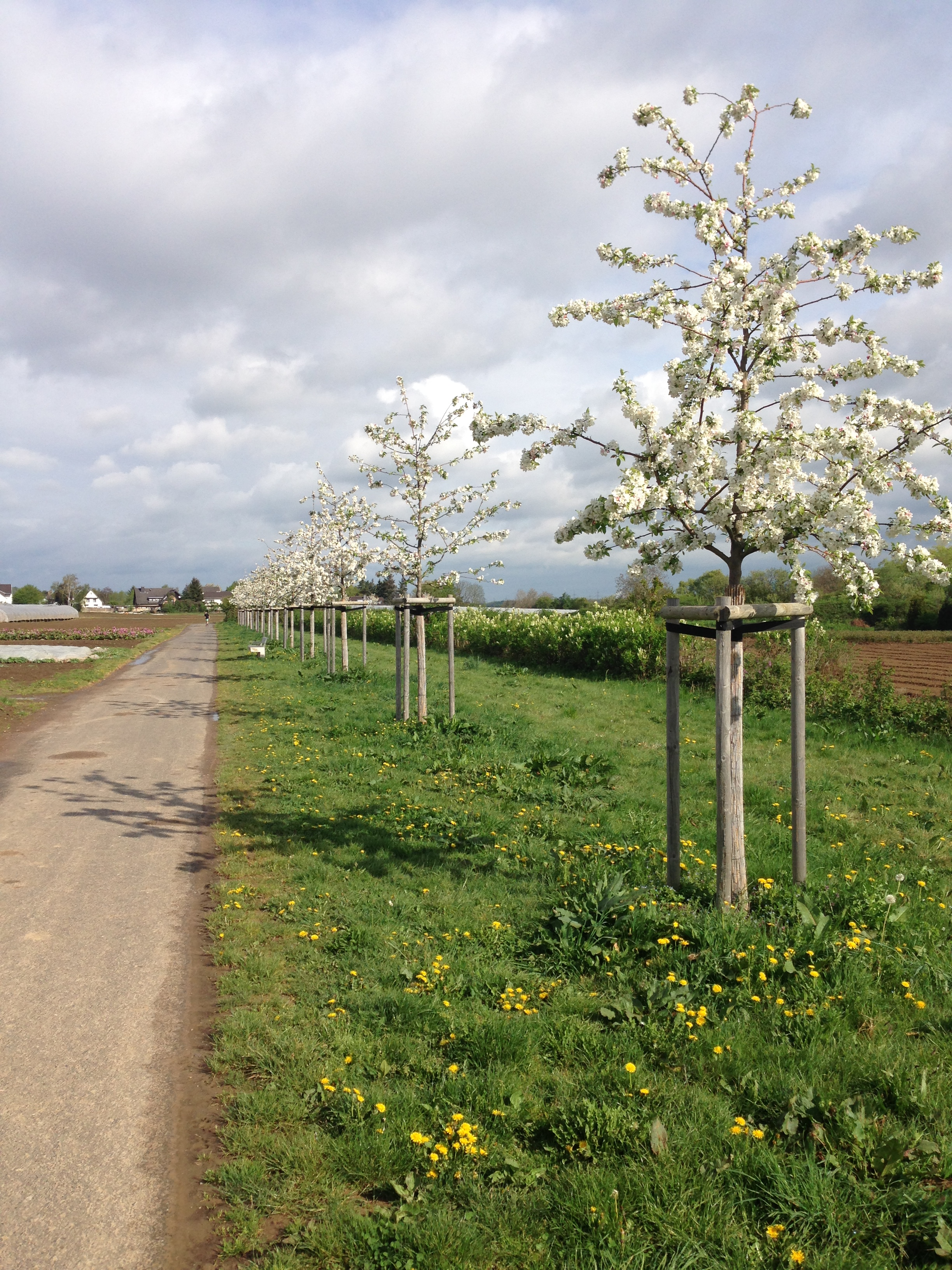 Baumreihe in Alfter